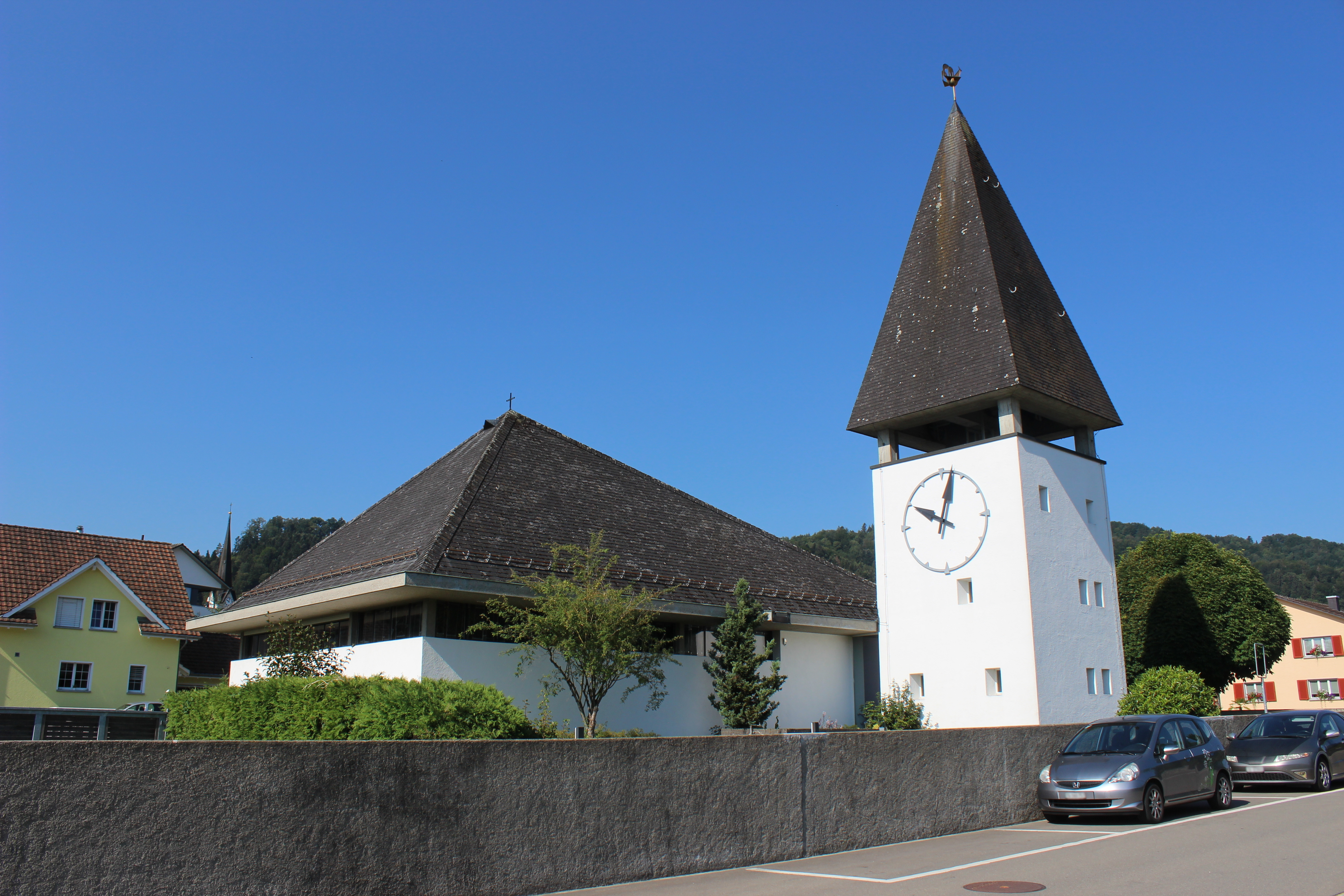 Evangelische Kirche Bichelsee aus Richtung Westen